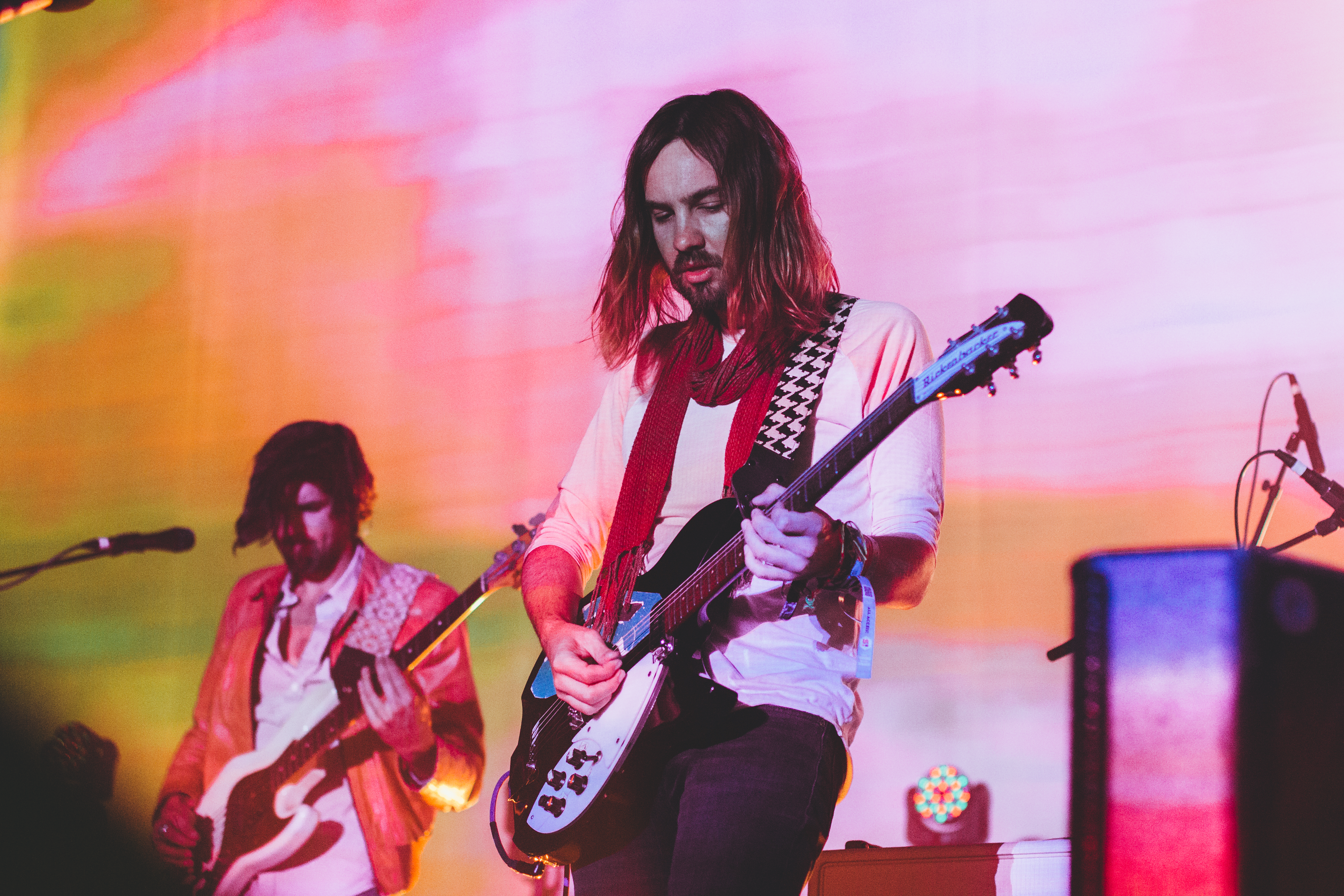 Tame_Impala-3730